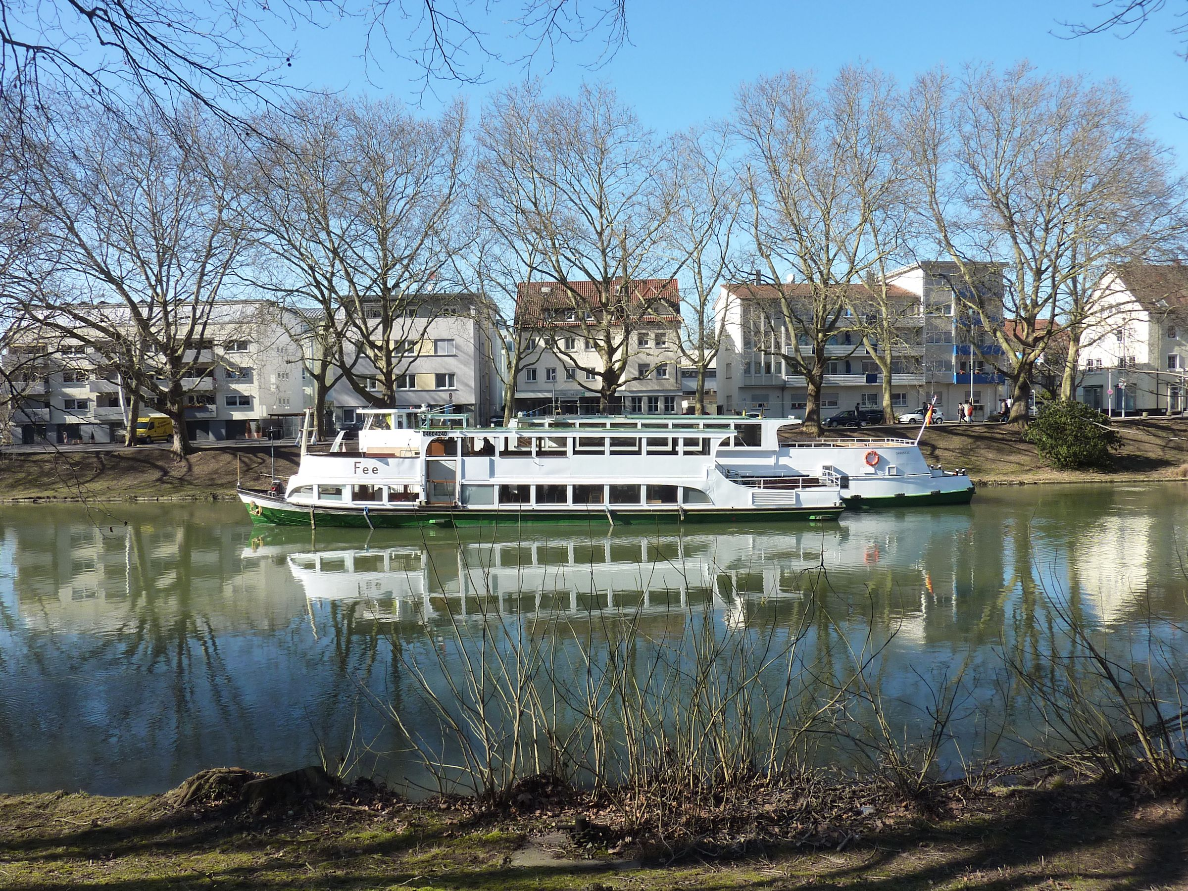 Schiff Fee, ex Georg Fischer auf dem Neckar in Heilbronn, dahinter der Neckarbummler